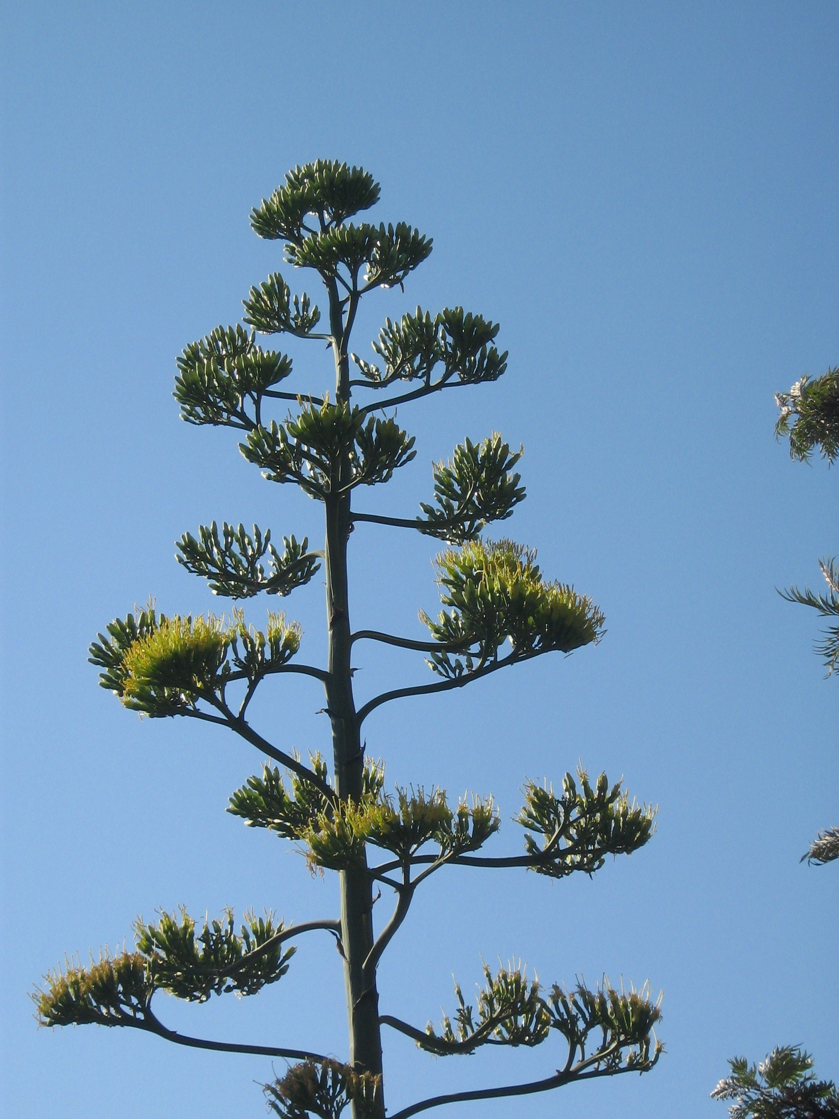 Agave americana